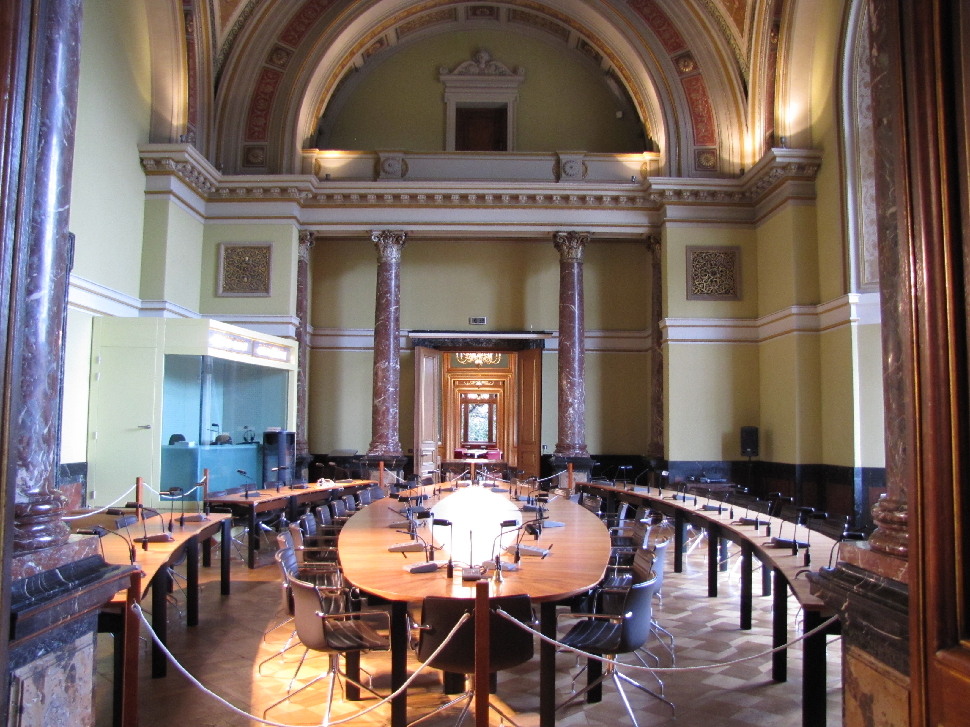 Alsace, Bas-Rhin, Strasbourg, Ancien Palais impérial allemand ou Kaiserpalatz (1888), dit Palais du Rhin, 1-2-3 place de la République: Ancienne Salle d'audience, aujourd'hui salle de réunions.